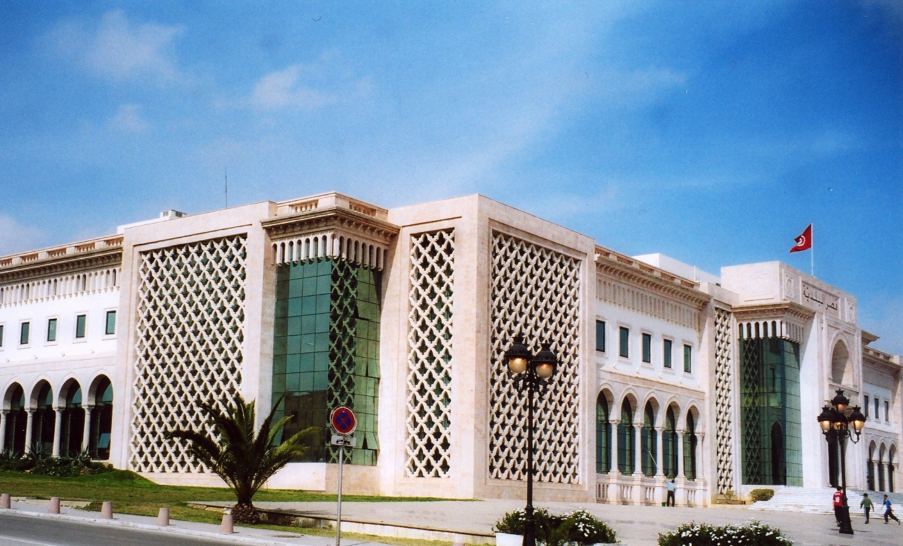 Hôtel de ville de Tunis (Tunisie)